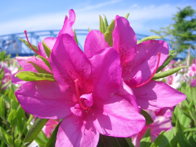 ツツジ - 新潟市の阿賀野川河川敷公園にて